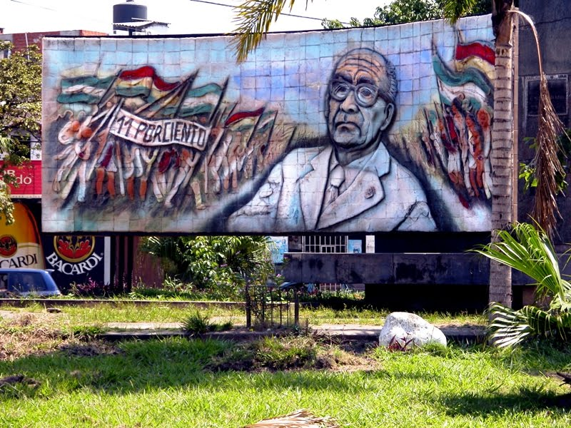 Movimiento de luchas cívicas por el 11% de las regalías petroleras en Santa Cruz.